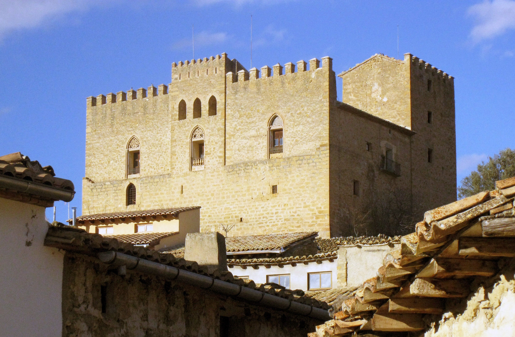 Castell de la Todolella